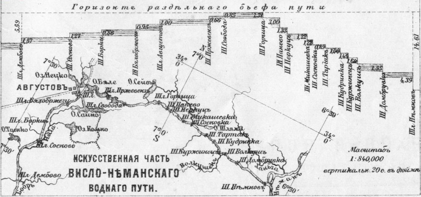 Августовский (Висло-Неманский) канал. «Искусственная часть Висло-Неманскаго воднаго пути»